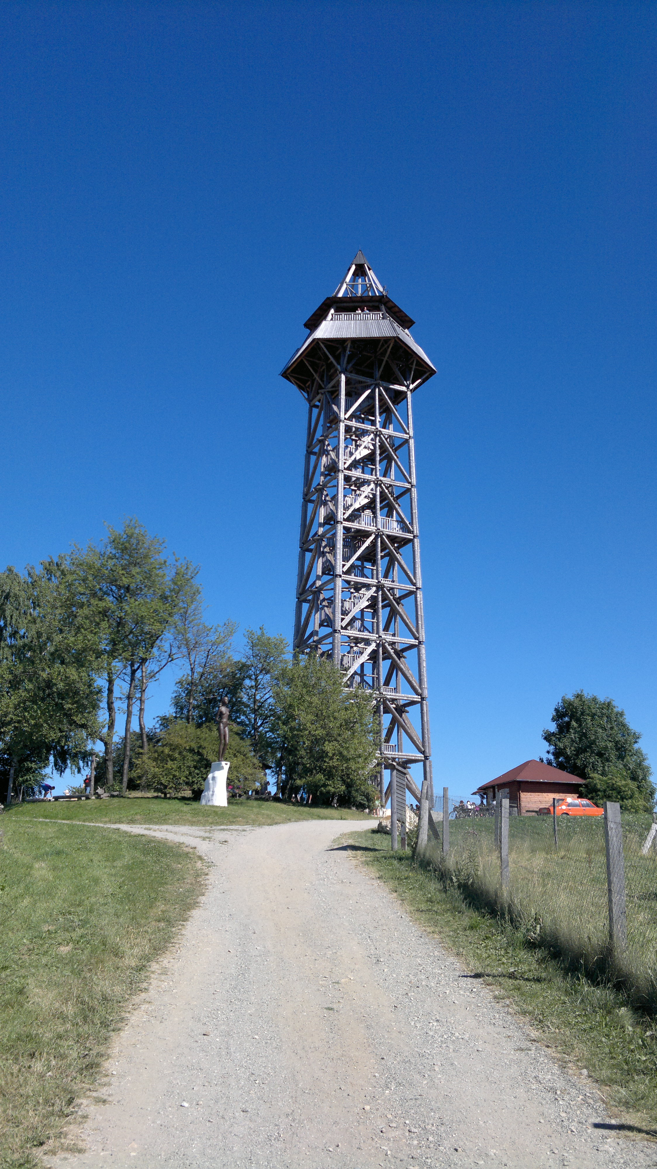 Rozhledna Bohdanka u obce Bohdaneč v okrese Kutná Hora